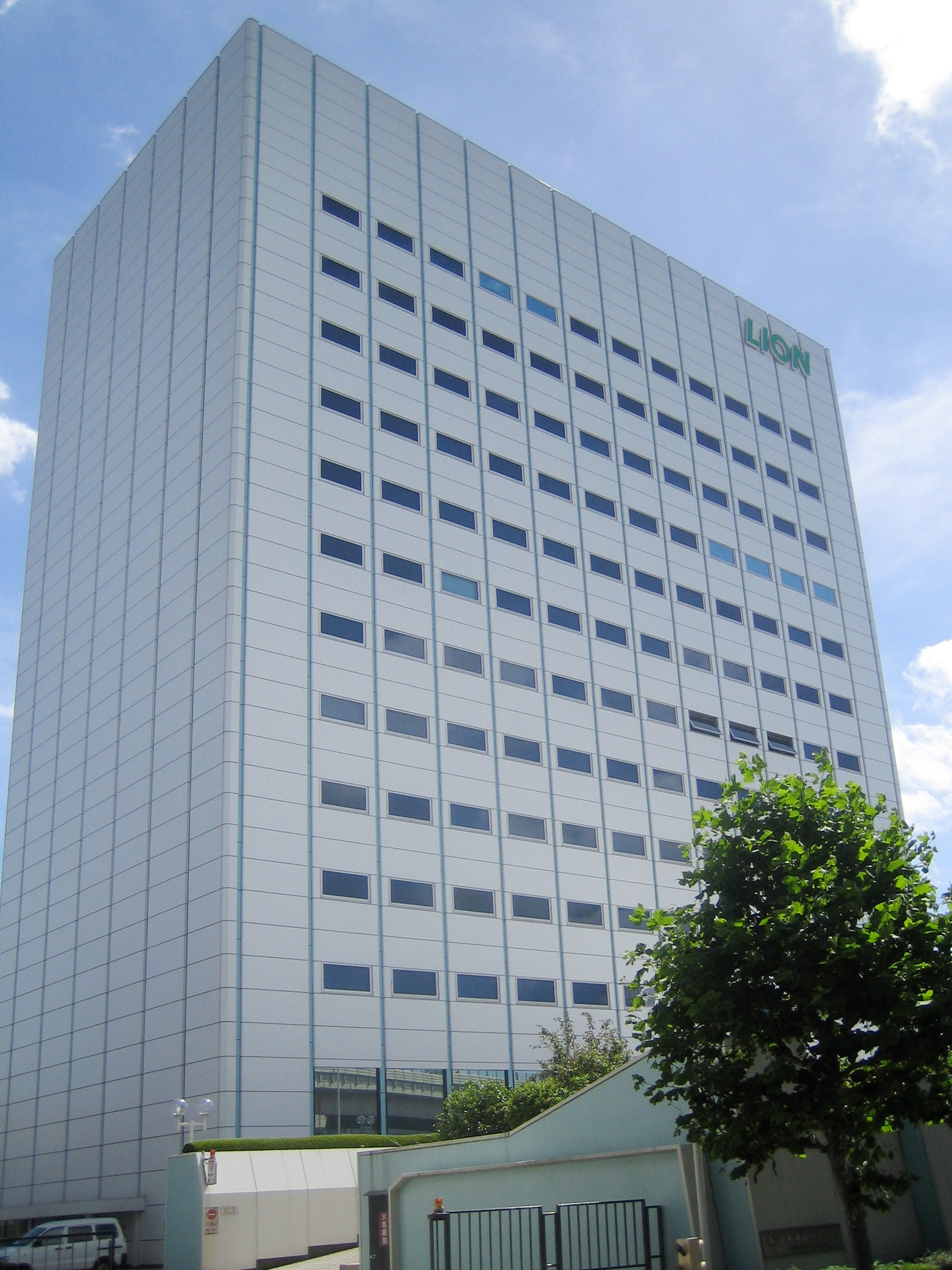 ライオン株式会社本社。東京都墨田区本所 Lion Corporation (ライオン株式会社), at Honjo, Sumida, Tokyo, Japan